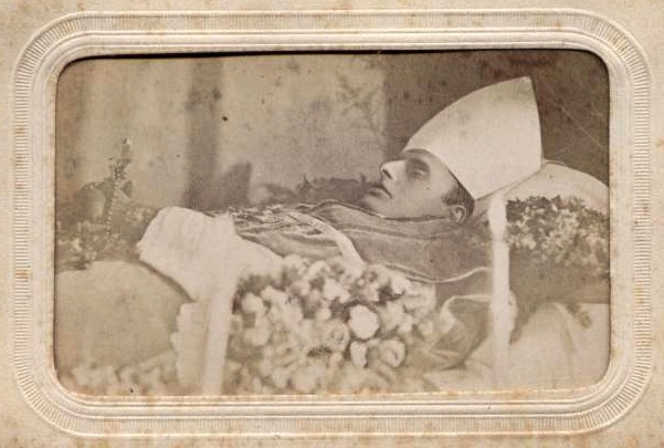 Bischof Daniel Bonifazius von Haneberg auf dem Sterbebett, Speyer, 1876